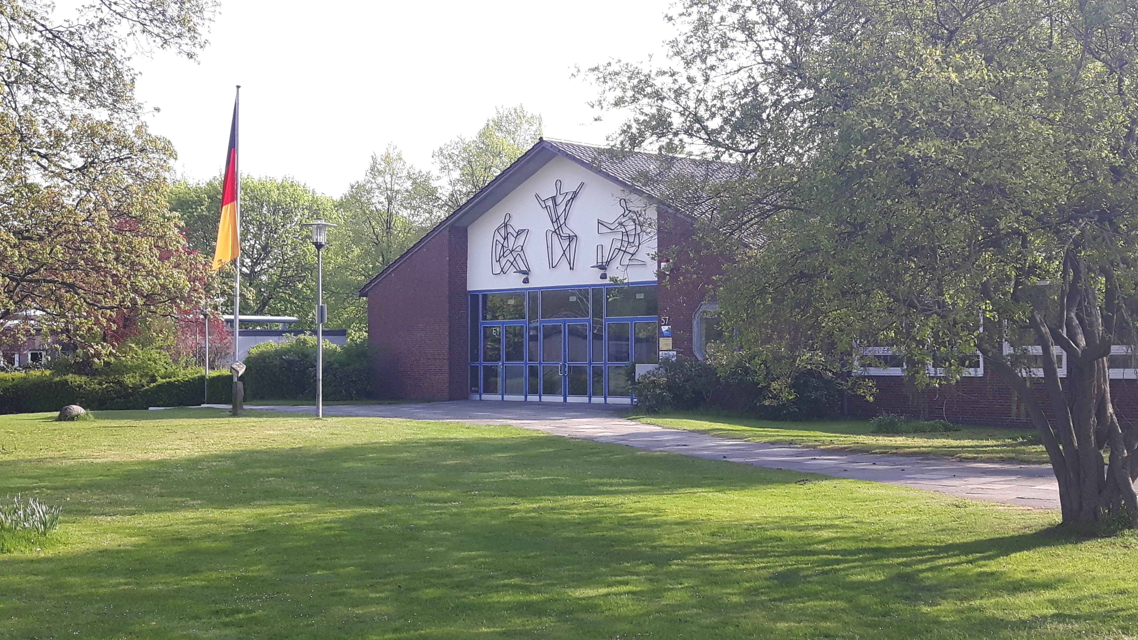 Haupteingang des Gymnasium Neue Oberschule in Braunschweig.